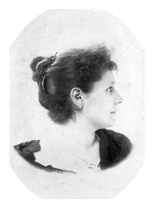 Княгиня Мария Дмитриевна Гагарина, ур. Оболенская (1864—1946)